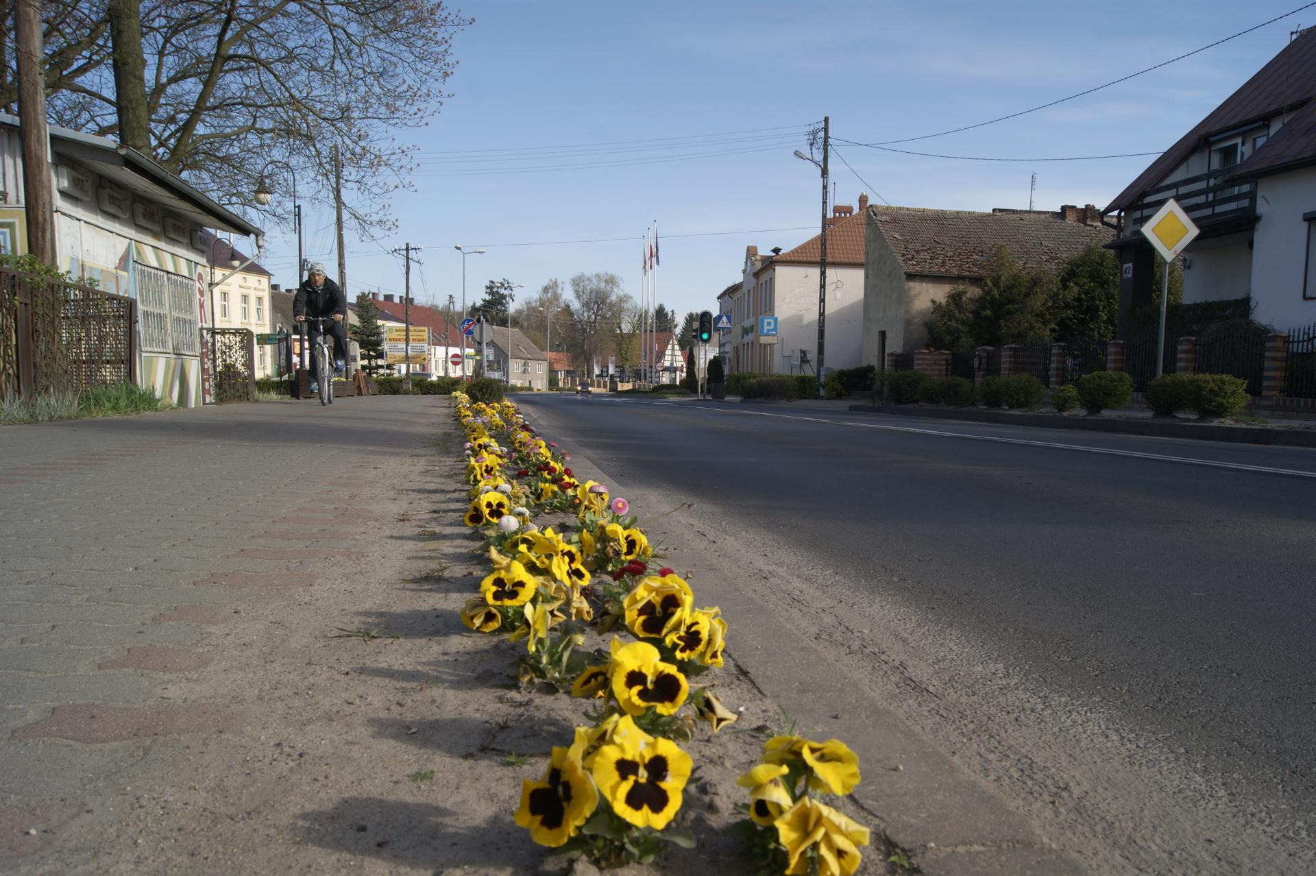 Kłodawa, ul. Gorzowska